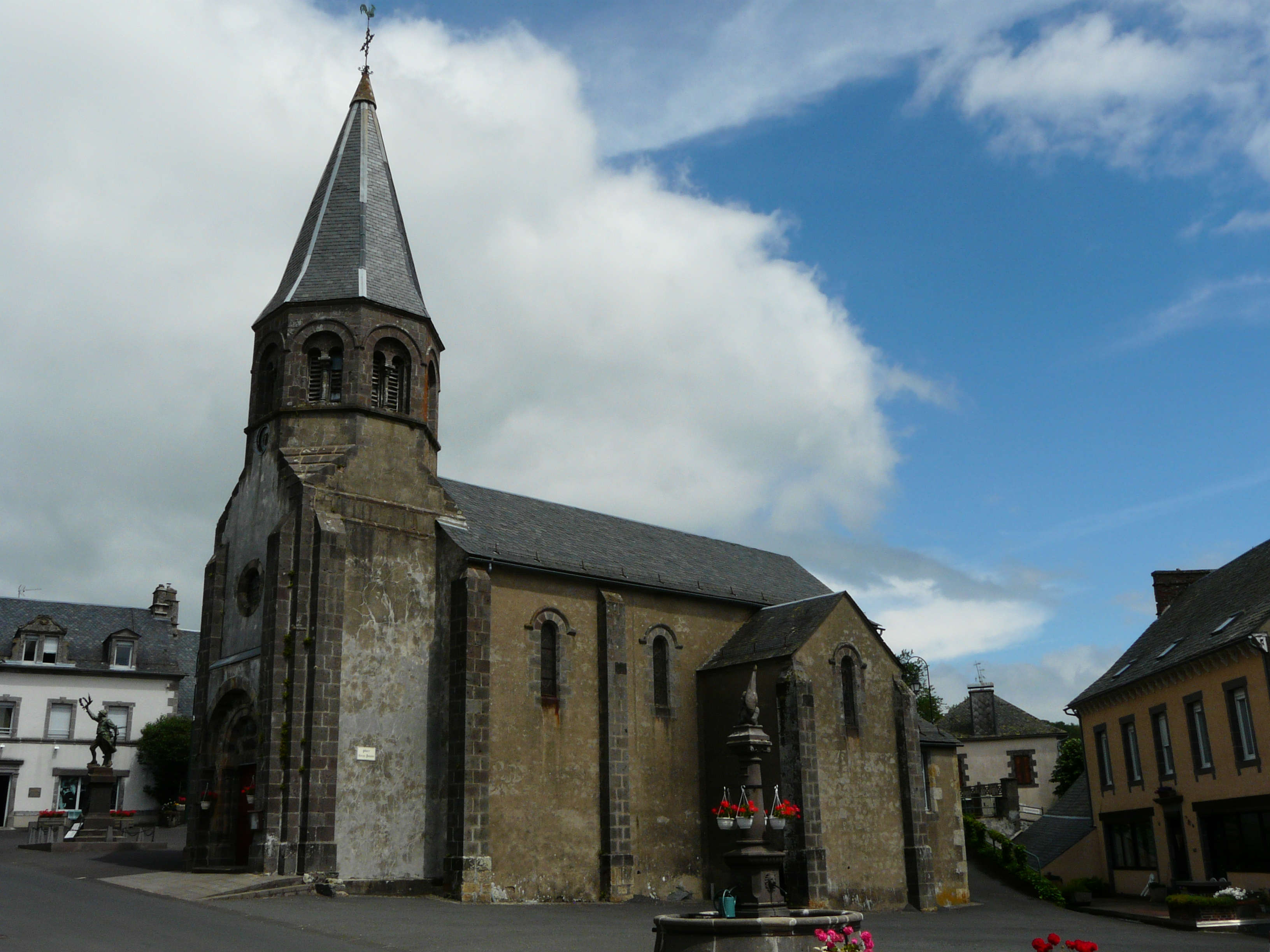 L'église Sainte-Anne, Montboudif, Cantal, France.